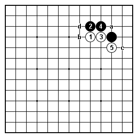 Go-Spiel: Joseki